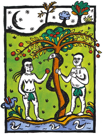 Keresztes Dóra: Ádám és Éva (metszet)